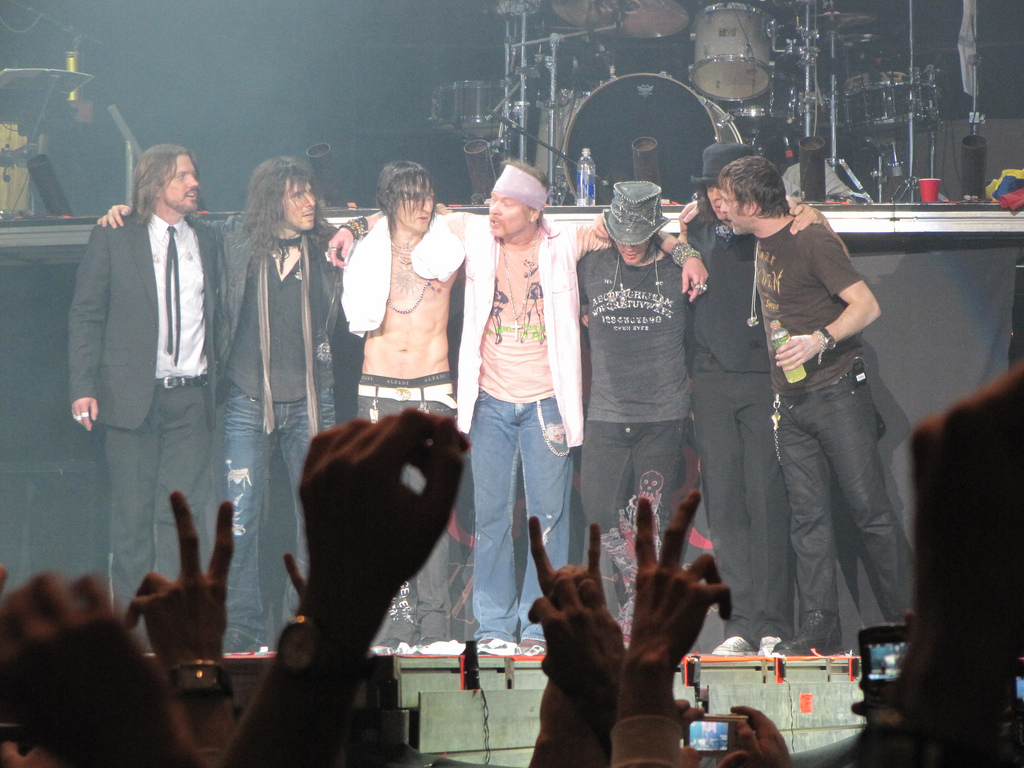 Guns n´Roses Poliedro de Caracas 27 de Marzo 2010